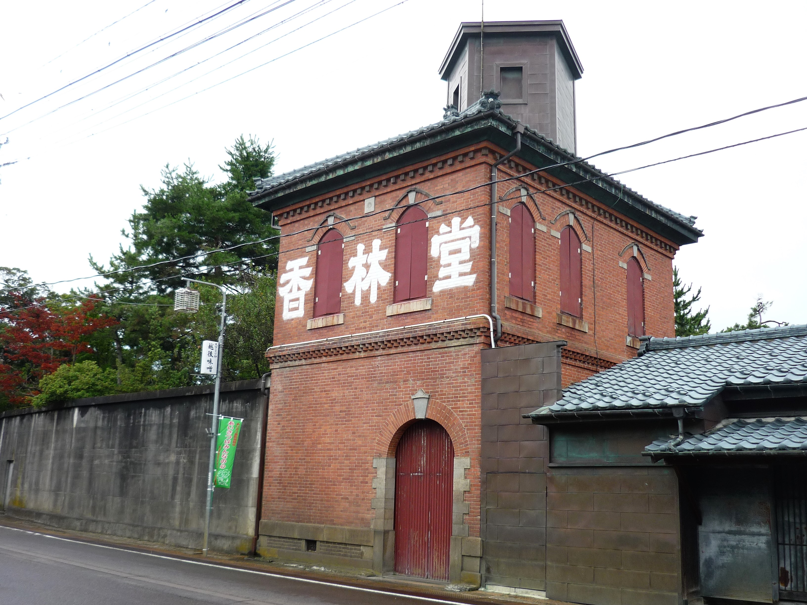 今井家住宅・西洋館（燕市吉田下町）